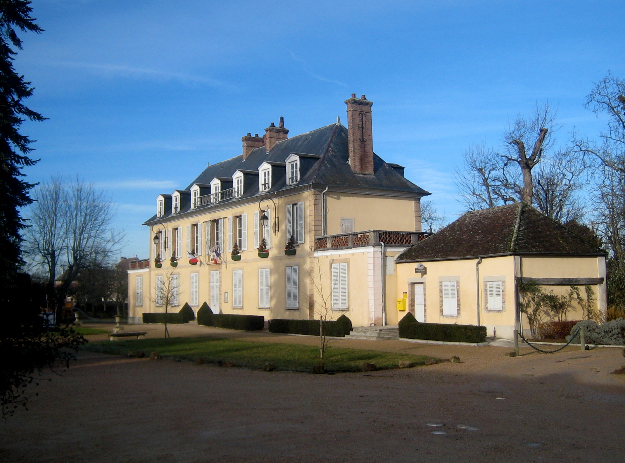 La nouvelle mairie de Cannes-Ecluse (Seine-et-Marne)